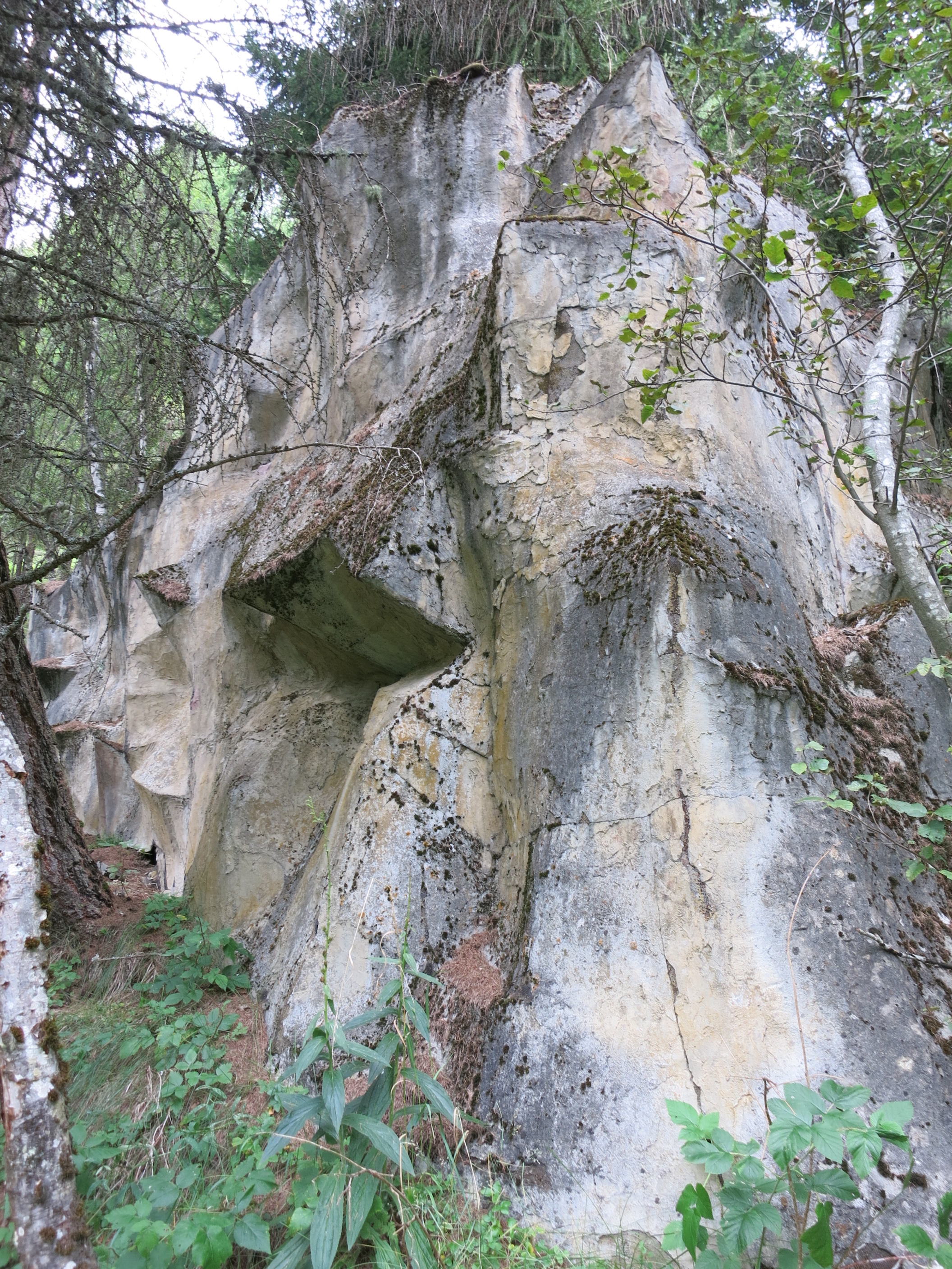 Sperrstelle Lavin GR, Schweiz